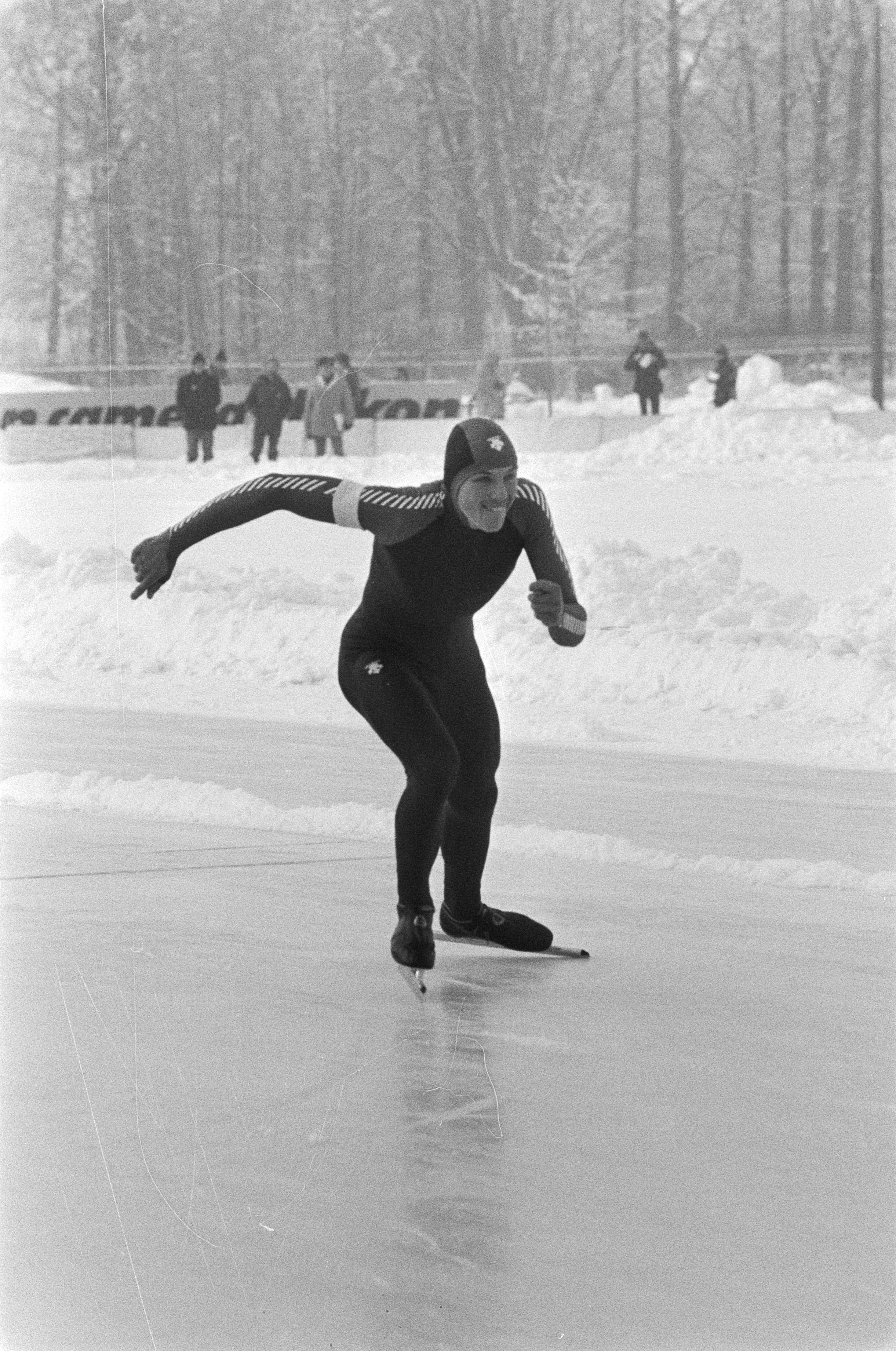 Collectie / Archief : Fotocollectie Anefo Reportage / Serie : [ onbekend ] Beschrijving : Schaatsinterland Nederland tegen Noorwegen in Groningen. Sprinter Geert Kuiper in actie. Datum : 19 december 1981 Locatie : Groningen Trefwoorden : schaatsen, sport Persoonsnaam : Kuiper Geert Fotograaf : Dijk, Hans van / Anefo Auteursrechthebbende : Nationaal Archief Materiaalsoort : Negatief (zwart/wit) Nummer archiefinventaris : bekijk toegang 2.24.01.05 Bestanddeelnummer : 931-8739